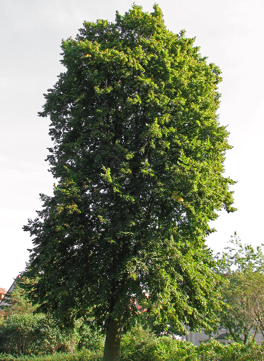 Beschreibung: Sommerlinde (Tilia platyphyllos) Fotograf: Darkone, 5. September 2005